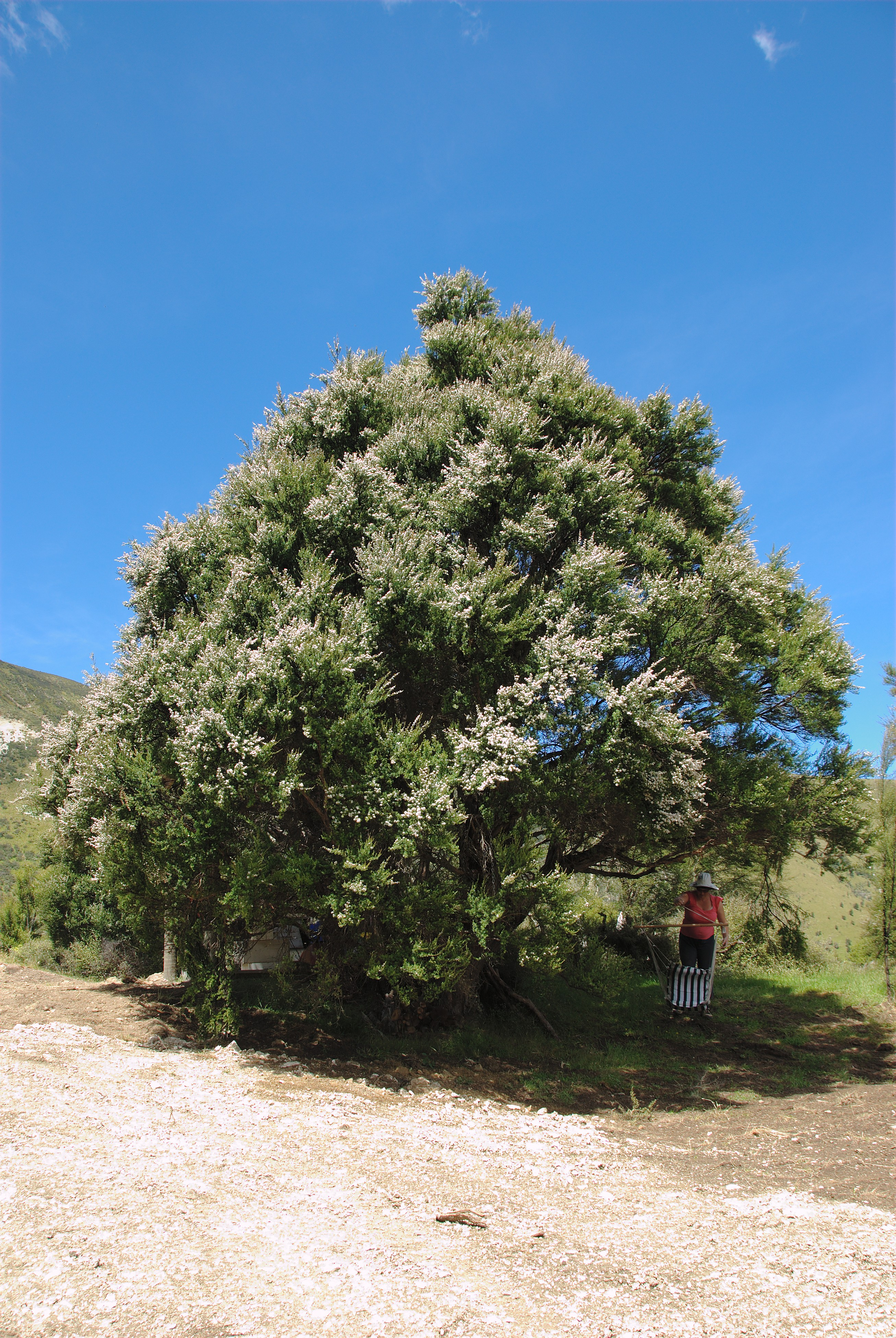 Mature Kanuka tree